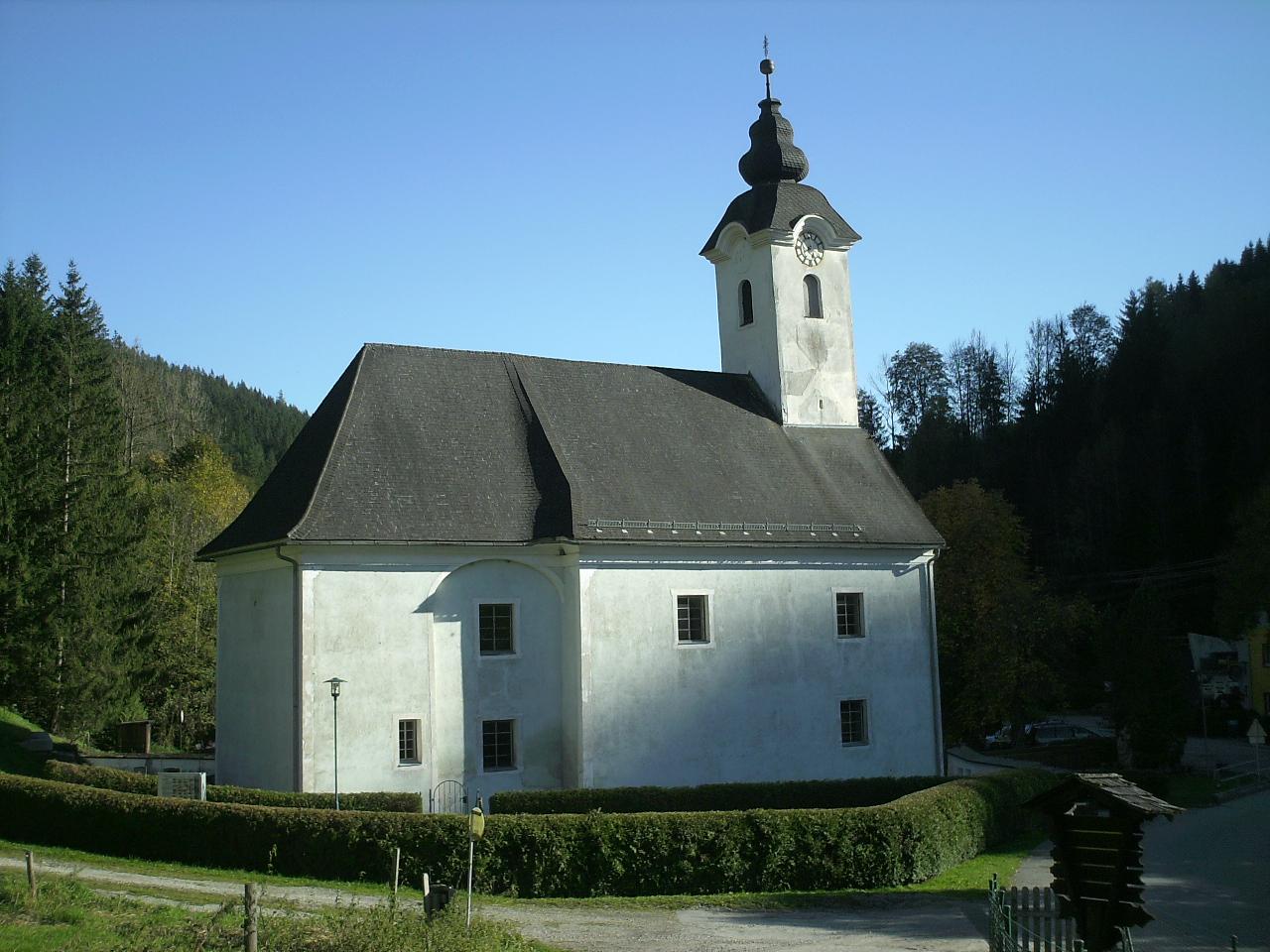 Kath. Filialkirche hl. Ägydius mit Kirchhof in St.Ilgen/Österreich